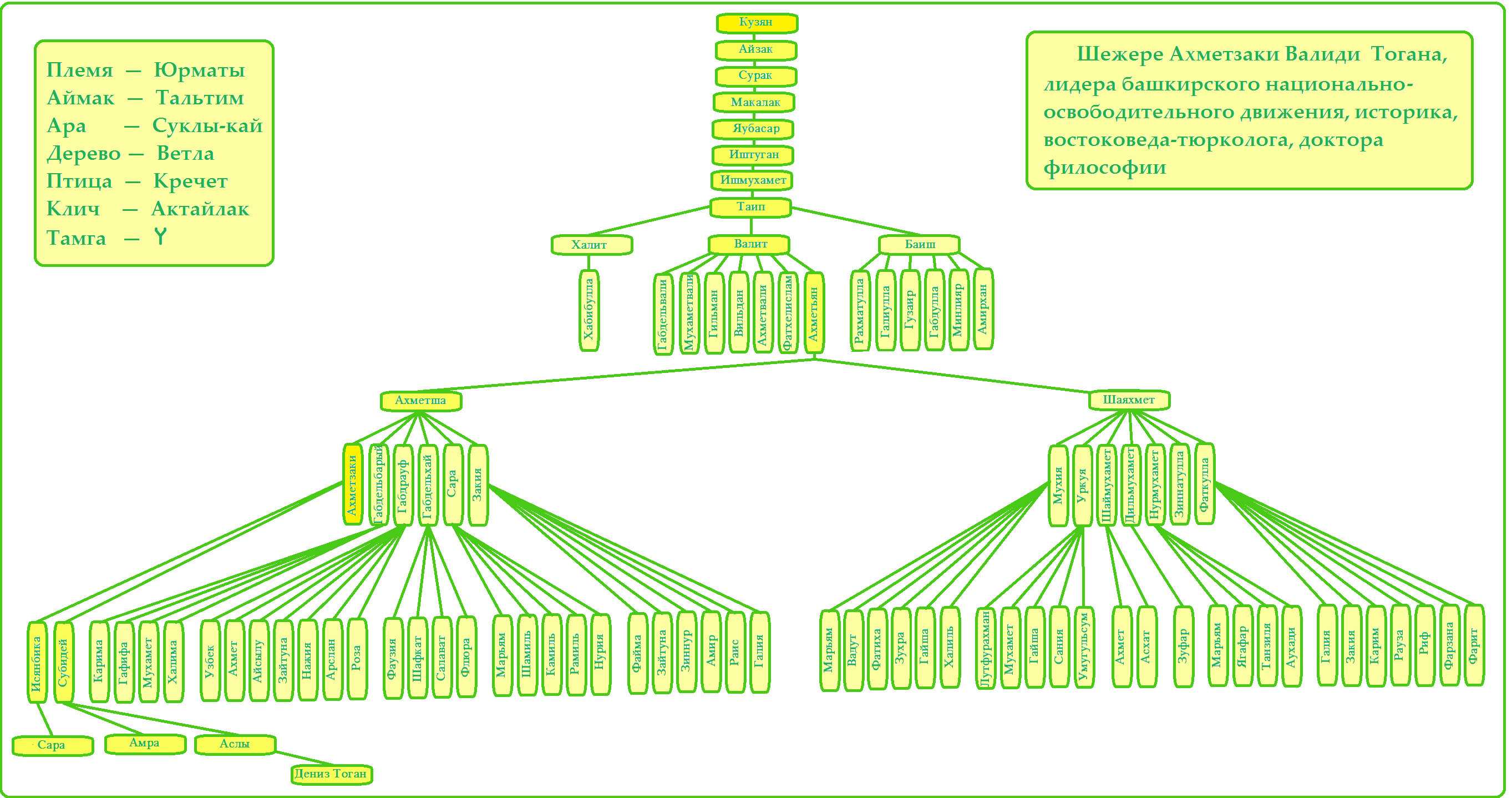 Шежере (родословная) Ахметзаки Валиди Тогана (1890—1970), лидера башкирского национально-освободительного движения (в 1917—1920 гг.)